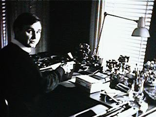 Guy Bleus in zijn Administration Centre